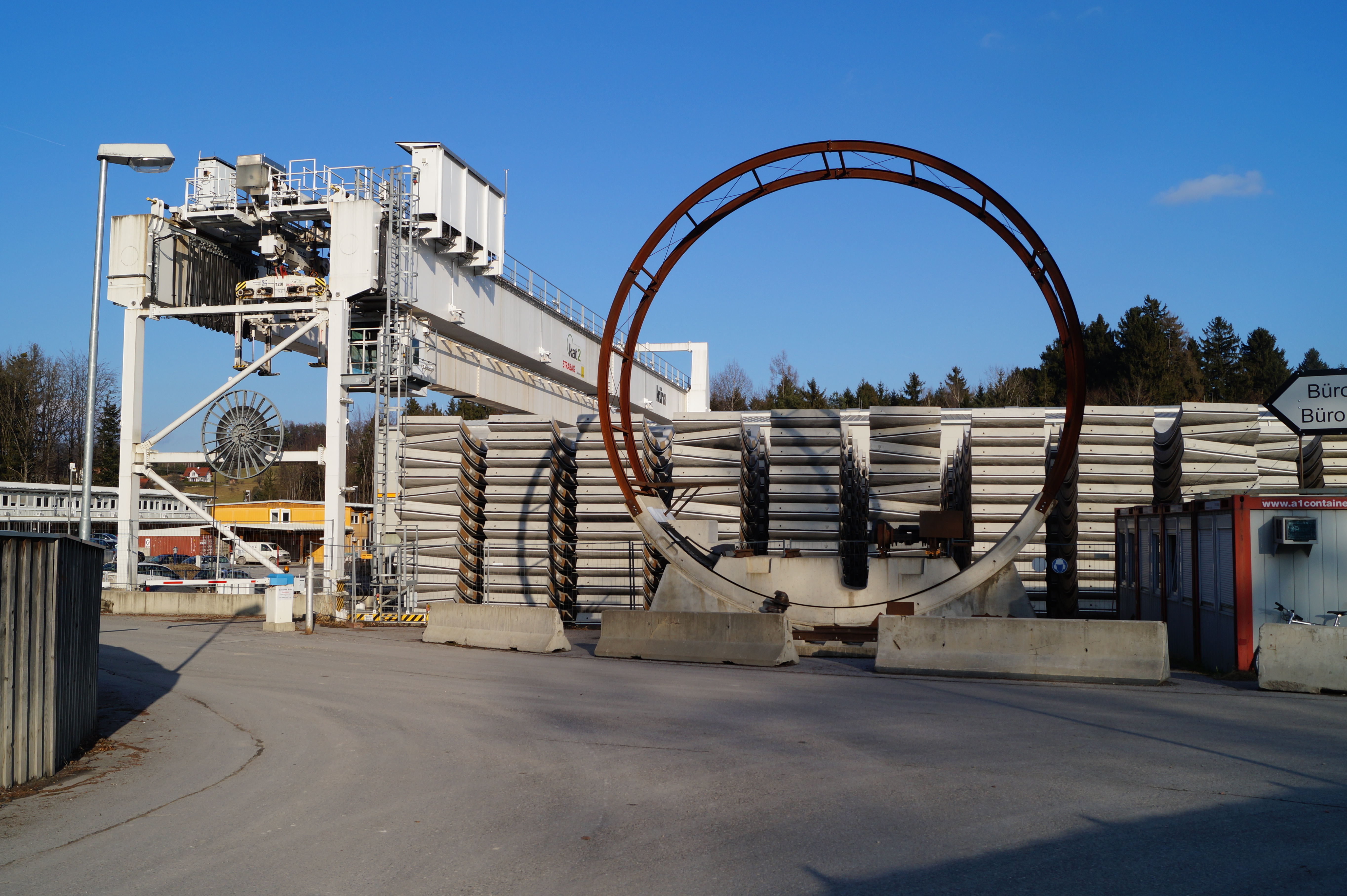 Der zweiröhrige Koralmtunnel stellt mit einer Länge von rund 32,9 km und maximalen Überlagerungen von rd. 1.200 m das Kernstück der neuen Hochleistungsstrecke zwischen Graz und Klagenfurt dar.